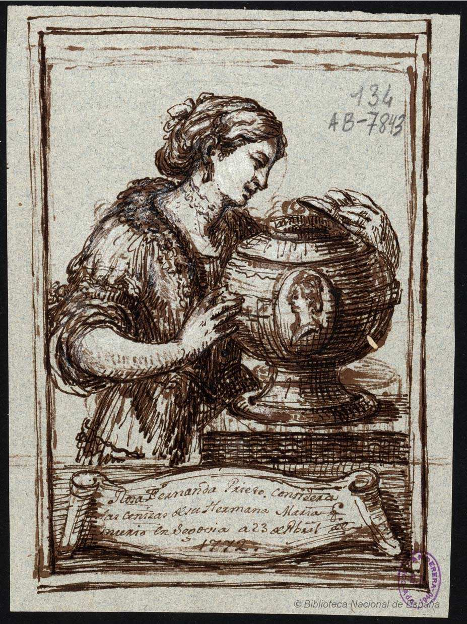 Tomás Francisco Prieto, Rosa Fernanda Prieto considera las cenizas de su Hermana María q. murió en Segovia a 23 de abril de 1772, dibujo a tintas marrones sobre papel grisáceo, Biblioteca Nacional de España